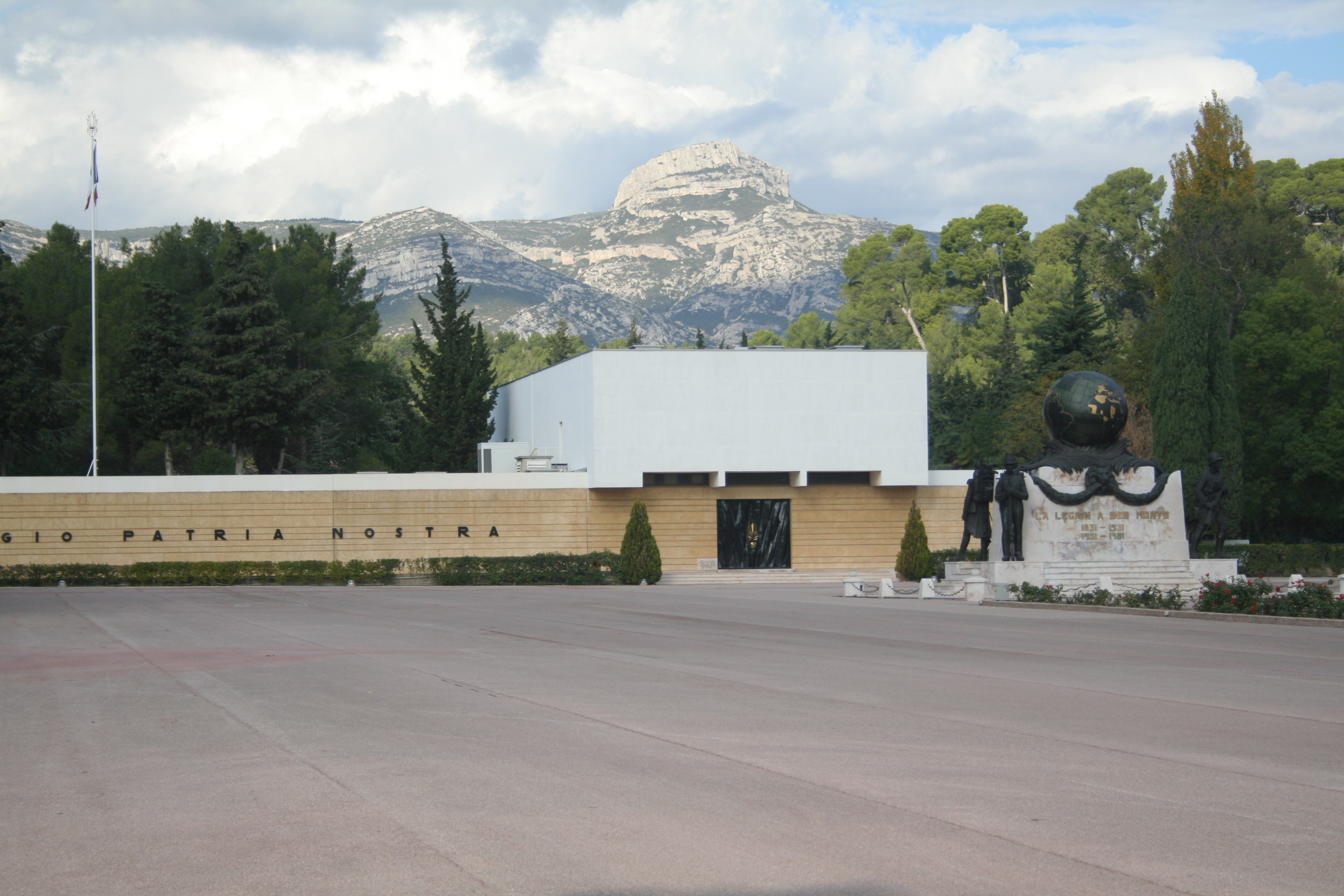 Façade du musée de la Légion étrangère